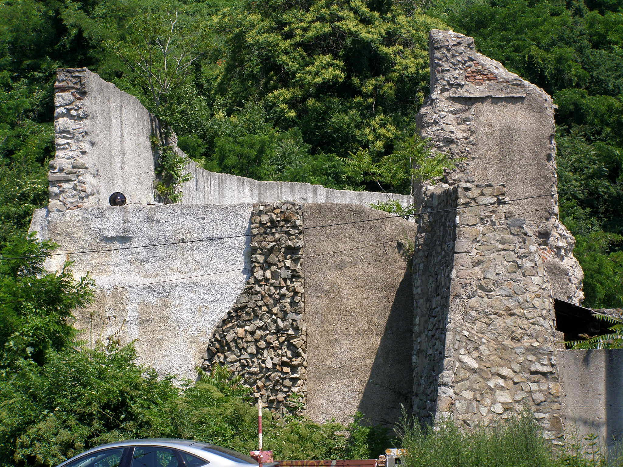 Vodná veža v bratislavskom Podhradí pochádza z päťdesiatych rokov 13. storočia